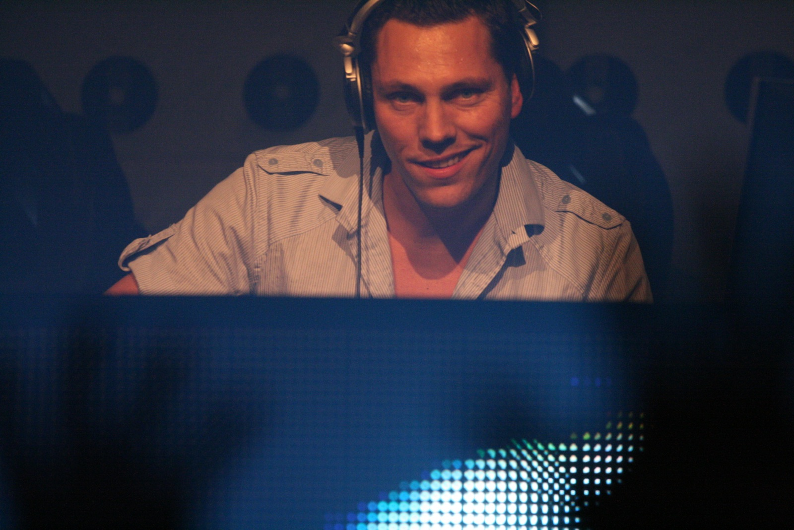 tiësto op lanceringsevent van Elements of Life